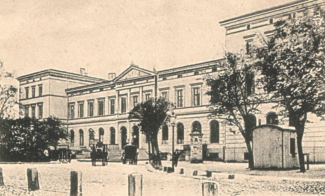 Fragment starej pocztówki Katowic przedstawiająca widok na stary dworzec przy ul. Dworcowej